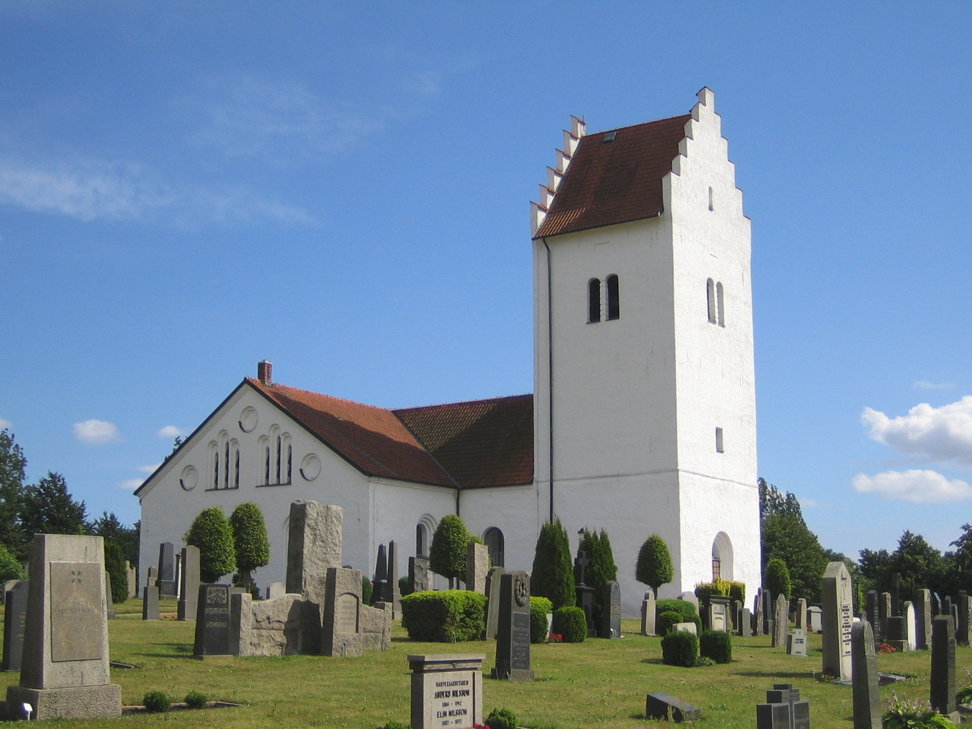 Skurups kyrka från norr. Bilden tagen av mig själv 26 juli 2005.